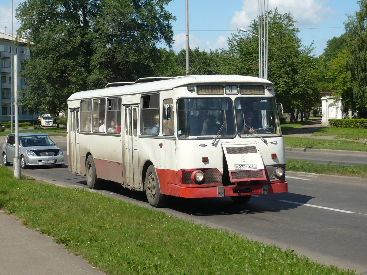 Один из нескольких ЛиАЗов в Железногорске